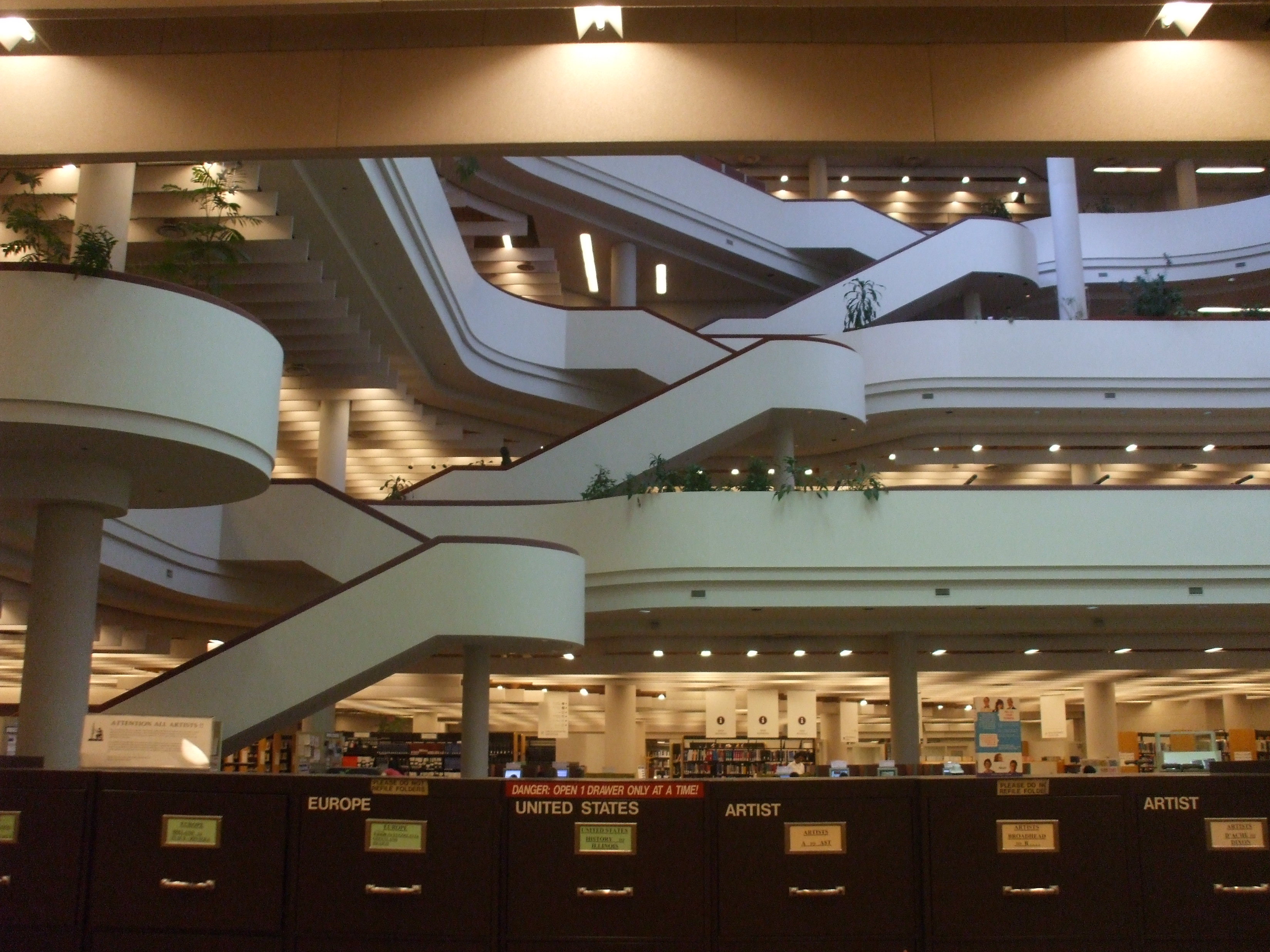 Toronto Reference Library interior, Toronto, Canada